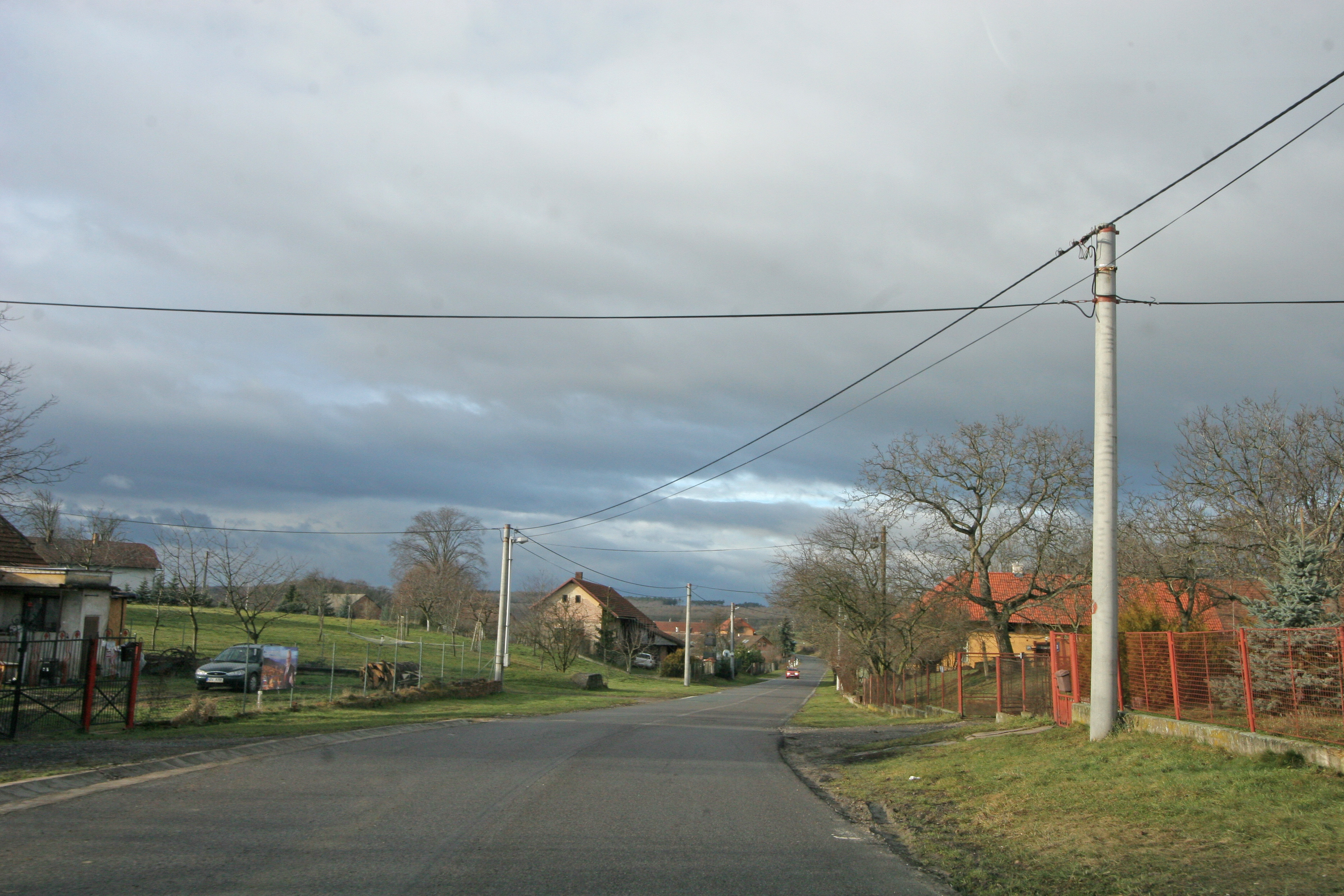 Pravy střed obce